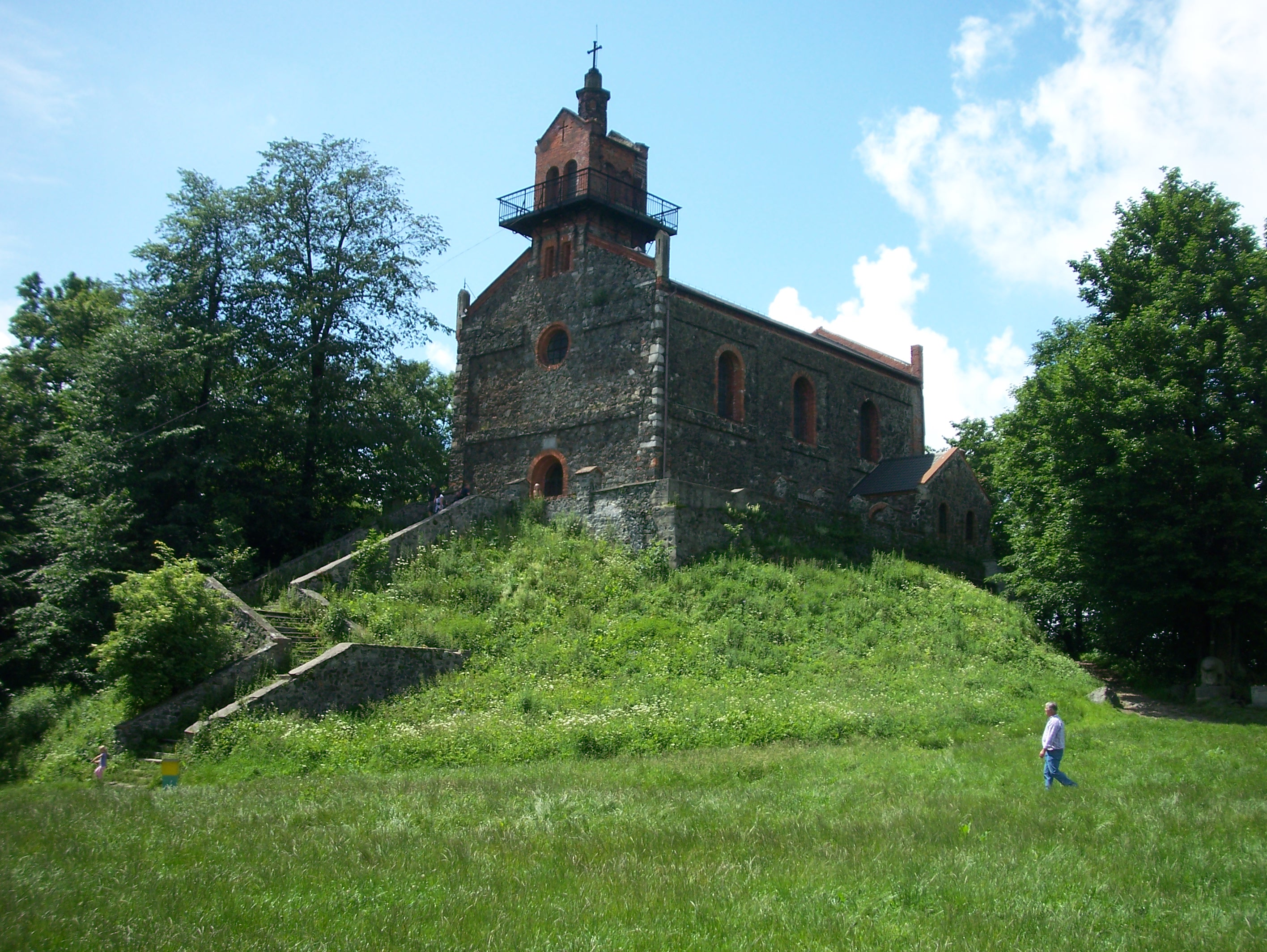 Kapelle auf der Spitze des Zobtenberg